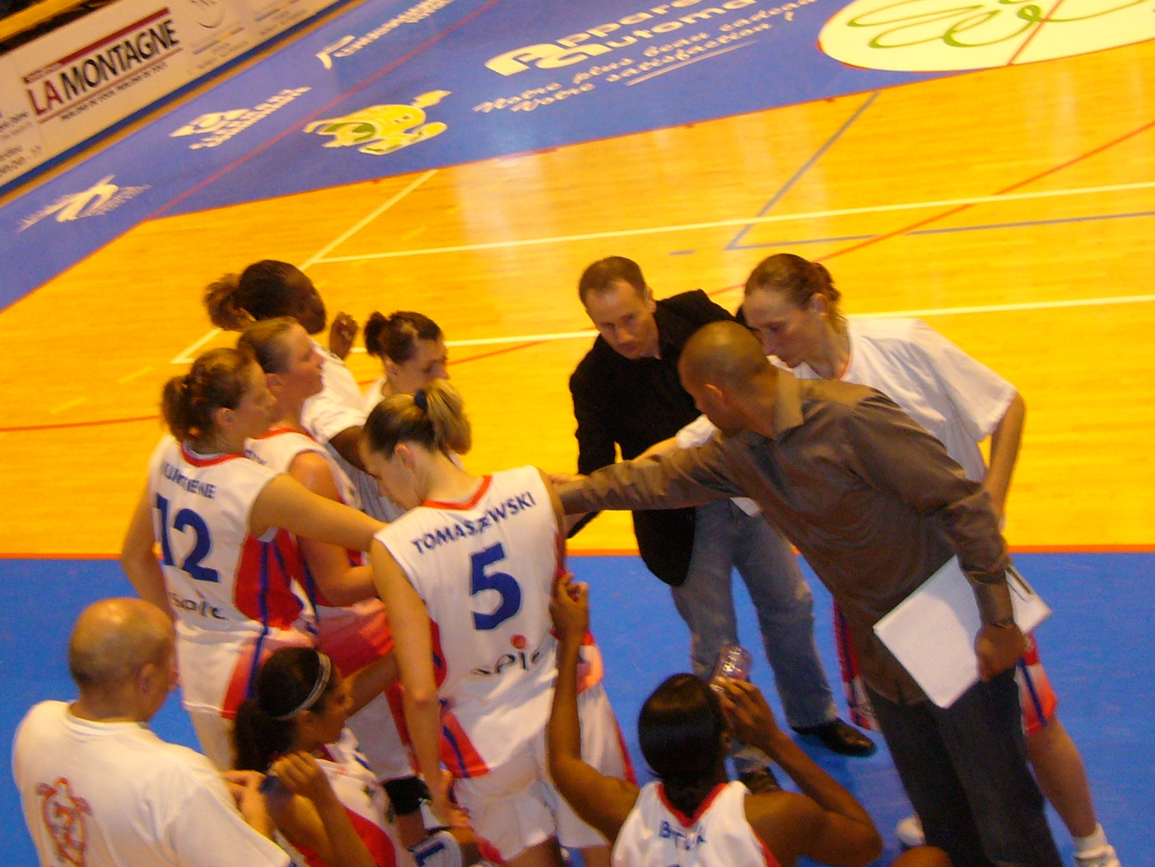 L'équipe de Ligue féminine de basketball du Stade clermontois Auvergne basket, lors du tournoi du coeur 2007 de Clermont-Ferrand